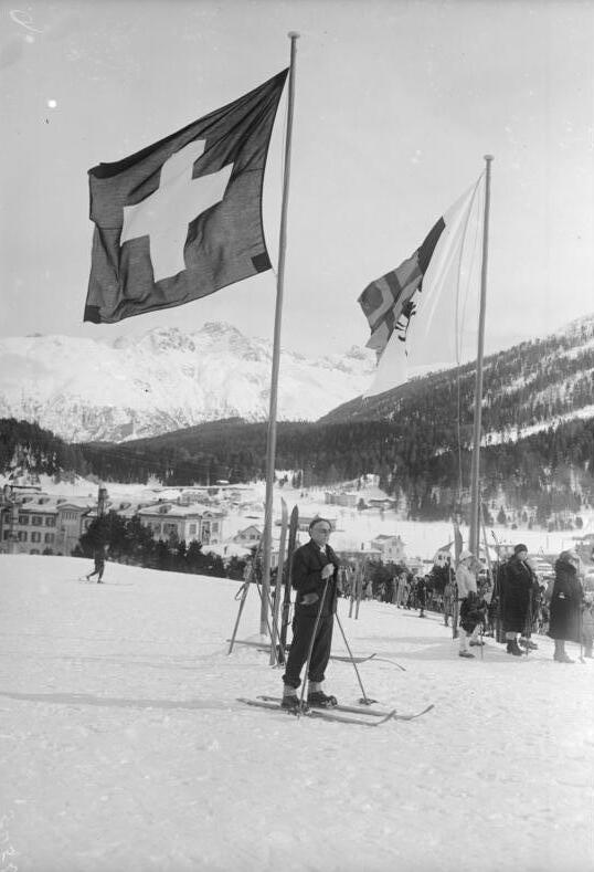 Das Marathon der Skiläufer! Der olympische Ski-Langlauf, welcher über 50 km führt, wurde von dem Schweden Hedlund gewonnen. Am Ziel des 50 km Langlaufes. Zuschauer in Erwartung der ersten Läufer.